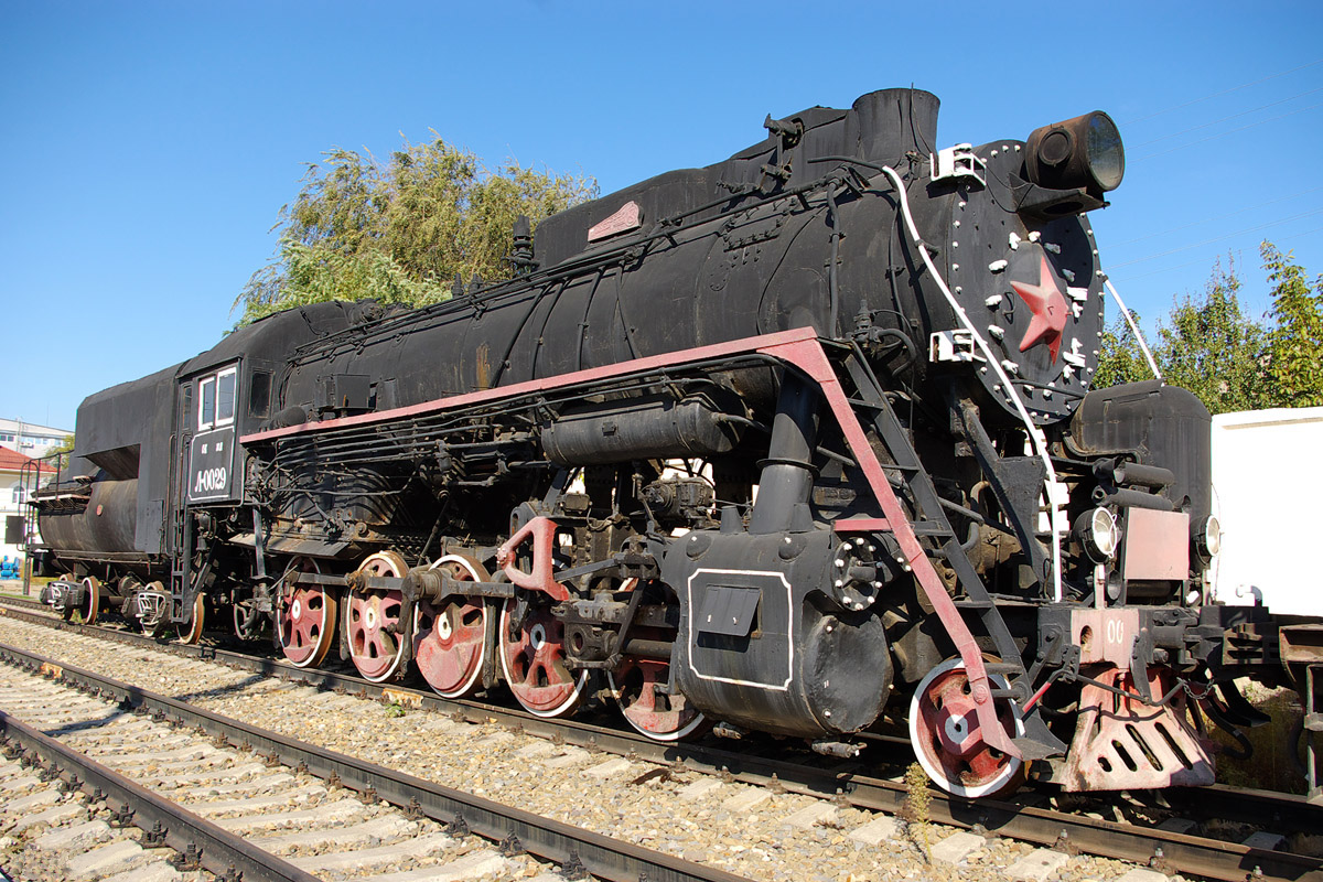 Паровоз Л-0029. Ростовский музей железнодорожного транспорта СКЖД